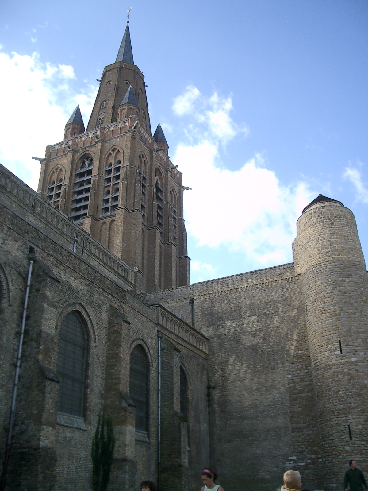 Eglise Notre-Dame (à Calais, en 2006). On remarque : . (A la date de l'import depuis Flickr par Marc ROUSSEL, l'auteur avait légendé sa photo ainsi : " ")